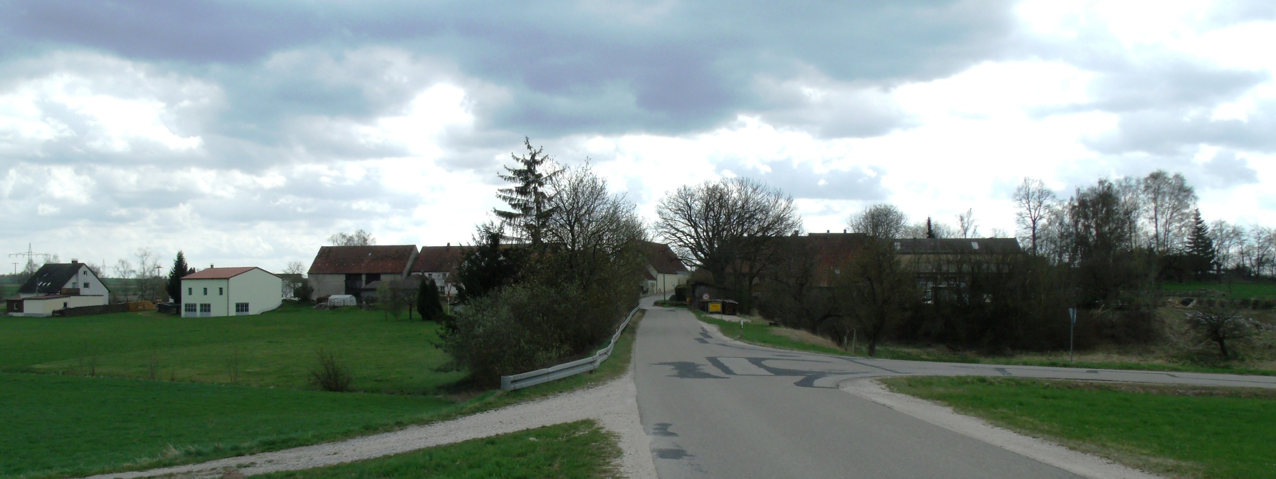 Höfen (Ansbach)